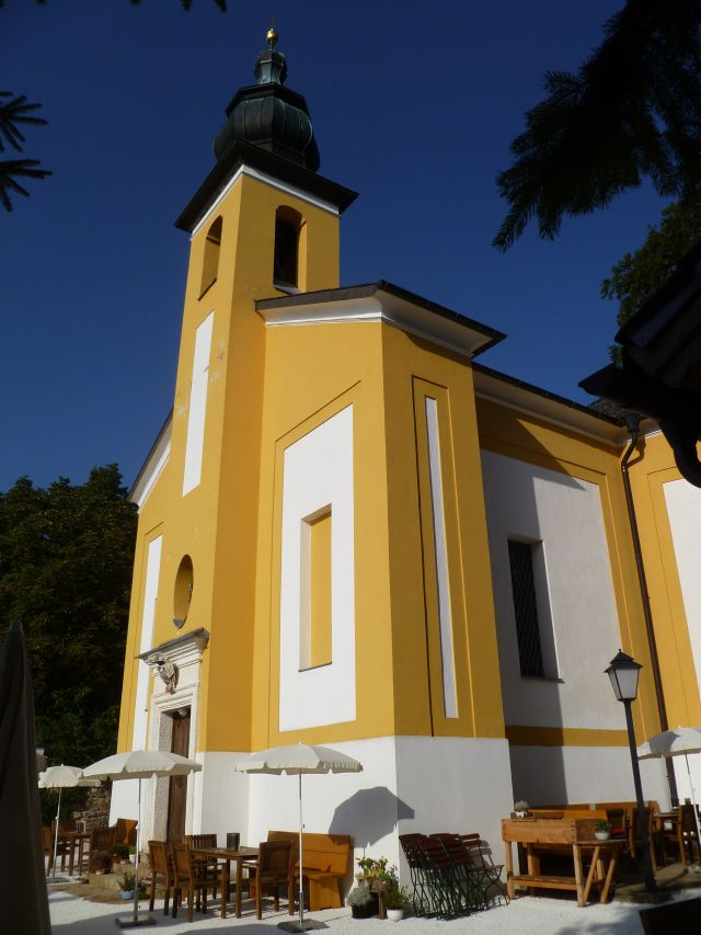 Kirche St. Pankraz am Haunsberg im Bereich der ehemaligen Burg Haunsberg, zugänglich über das Gelände eines gastronomischen Betriebs